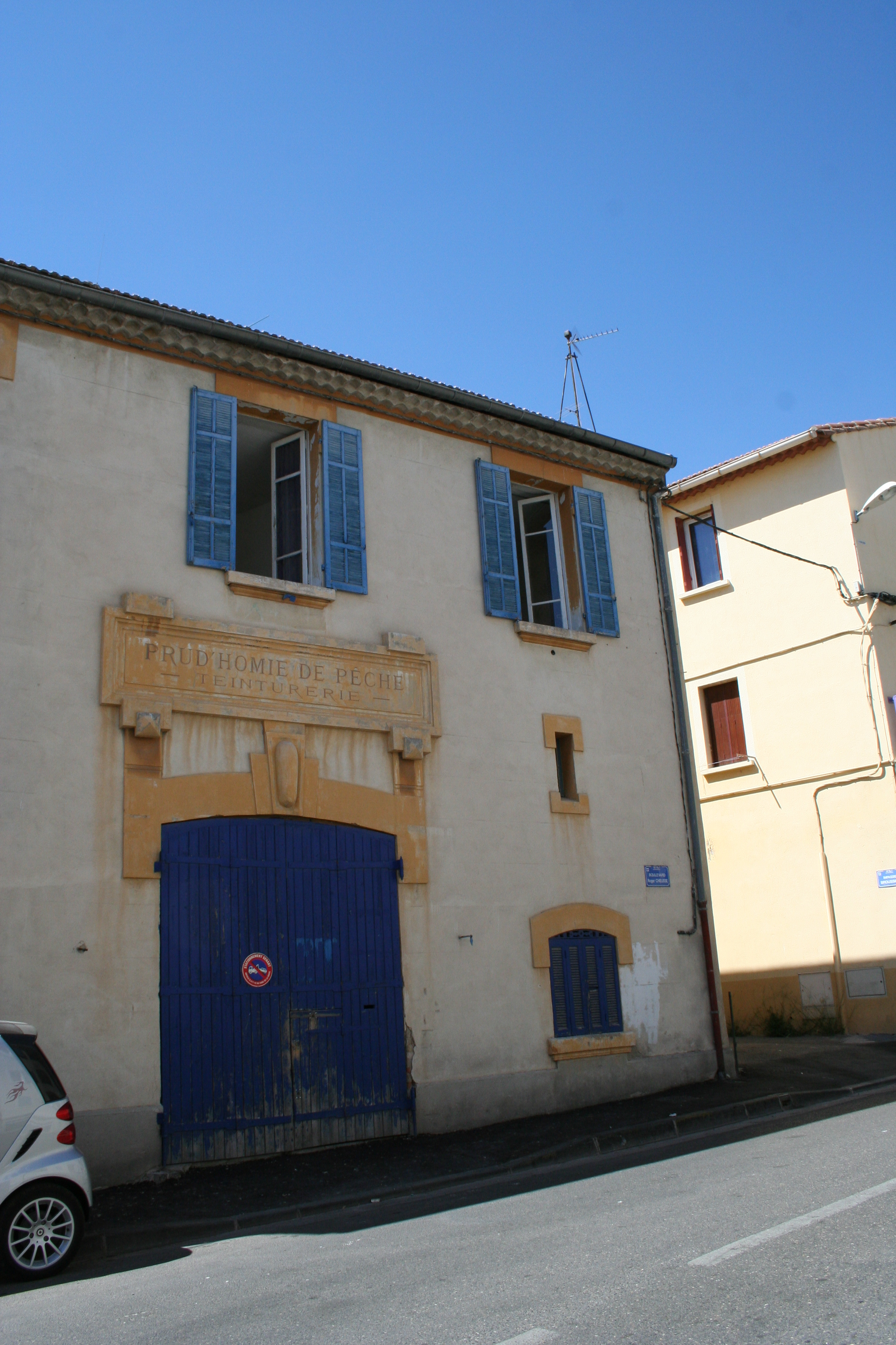 Marseille, quartier de L'Estaque : Prud'homie des pêcheurs où étaient teints les filets des pêcheurs. Usine classée monument historique